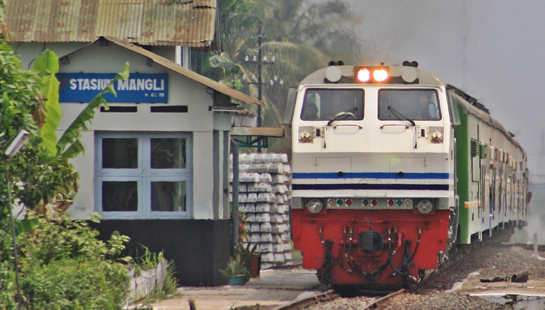 Kereta api Mutiara Timur dari Surabaya berjalan langsung di Stasiun Mangli.